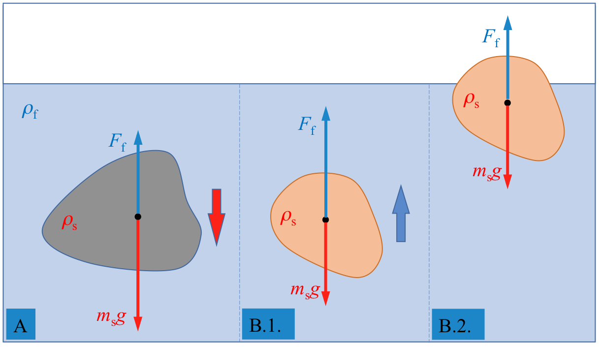 Solidoek fluidoetan duten flotazioaren edo hondorapenaren eskema, solidoaren eta fluidoaren dentsitateen arabera.